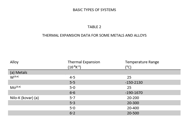 Thermal expansion data for some metals and alloys